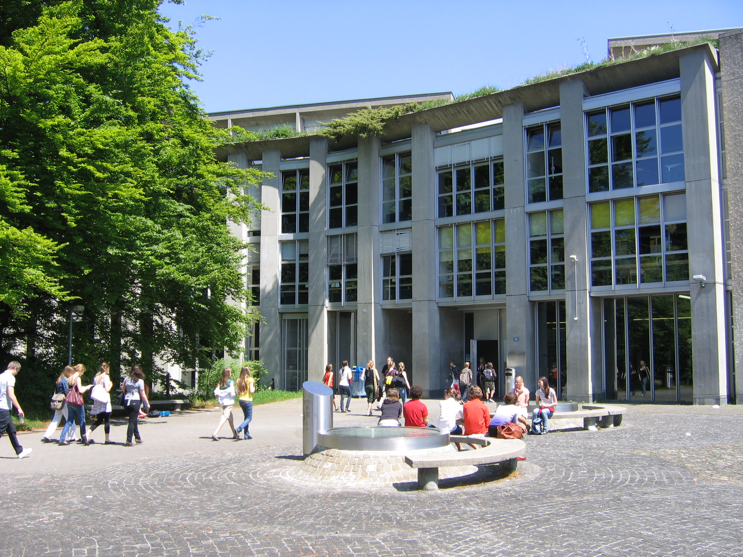 Schulgebäude Rämibühl vom Pausenplatz aus